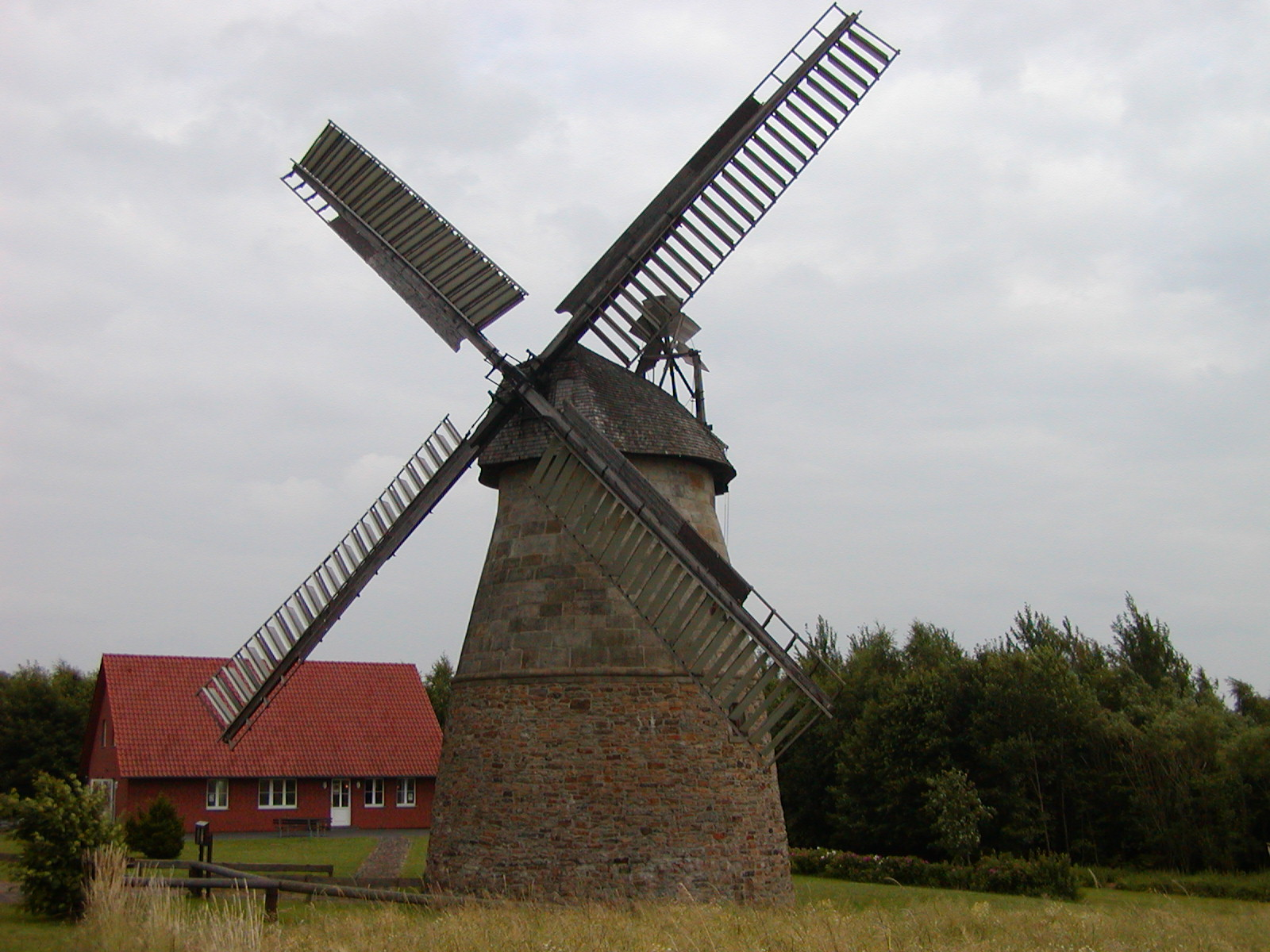 Mühle Eisbergen Sonstiges: ... This is a photograph of an architectural monument.